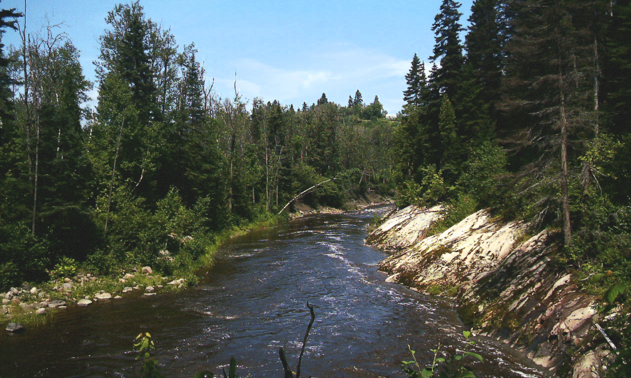 Rivière-du-Moulin (Langevin) à la hauteur du moulin